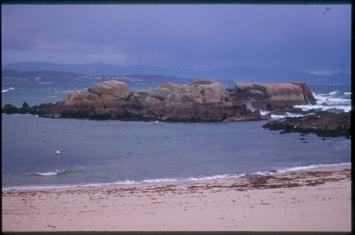 Playa nautico san vicente do mar